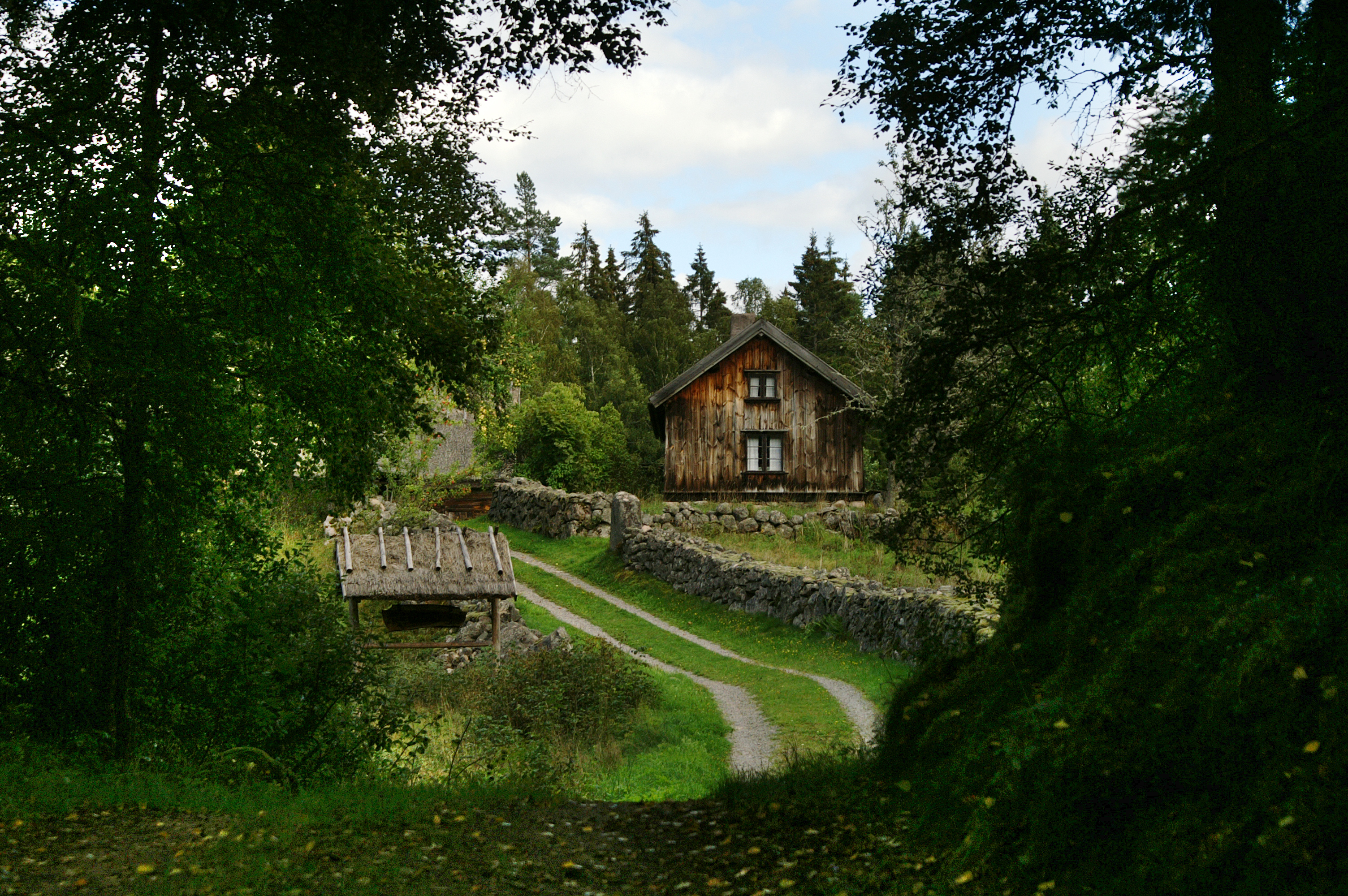 Bastöna Gammelgård, Norra Vånga socken, Skånings härad, Vara kommun, Västergötland, Västra Götalands län, Sverige.